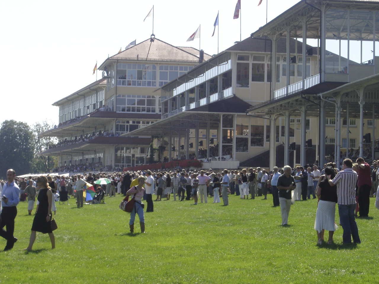 Sattelplatz Rannbahn Baden-Baden-Iffezheim